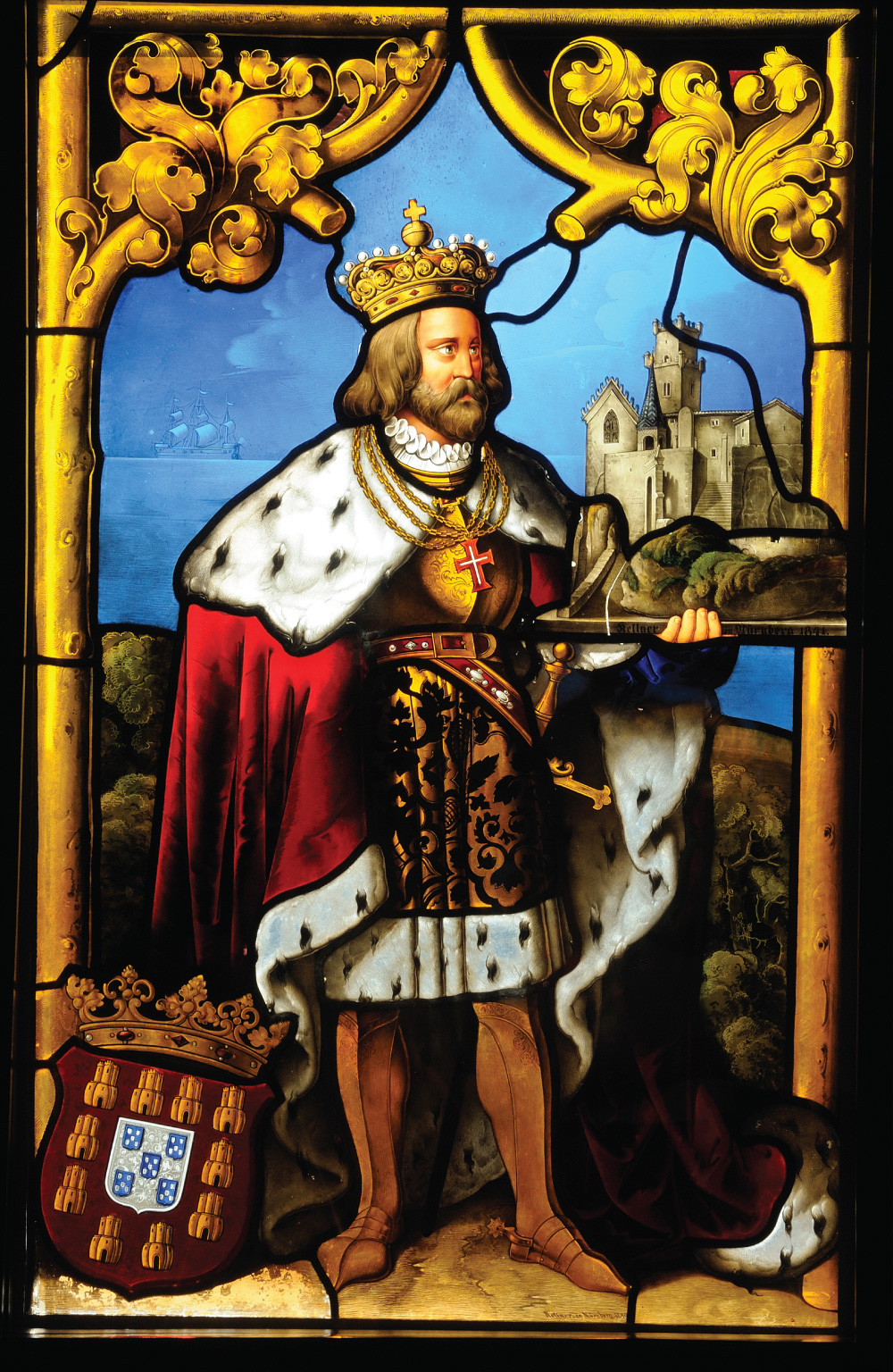 Vitral de D. Manuel I